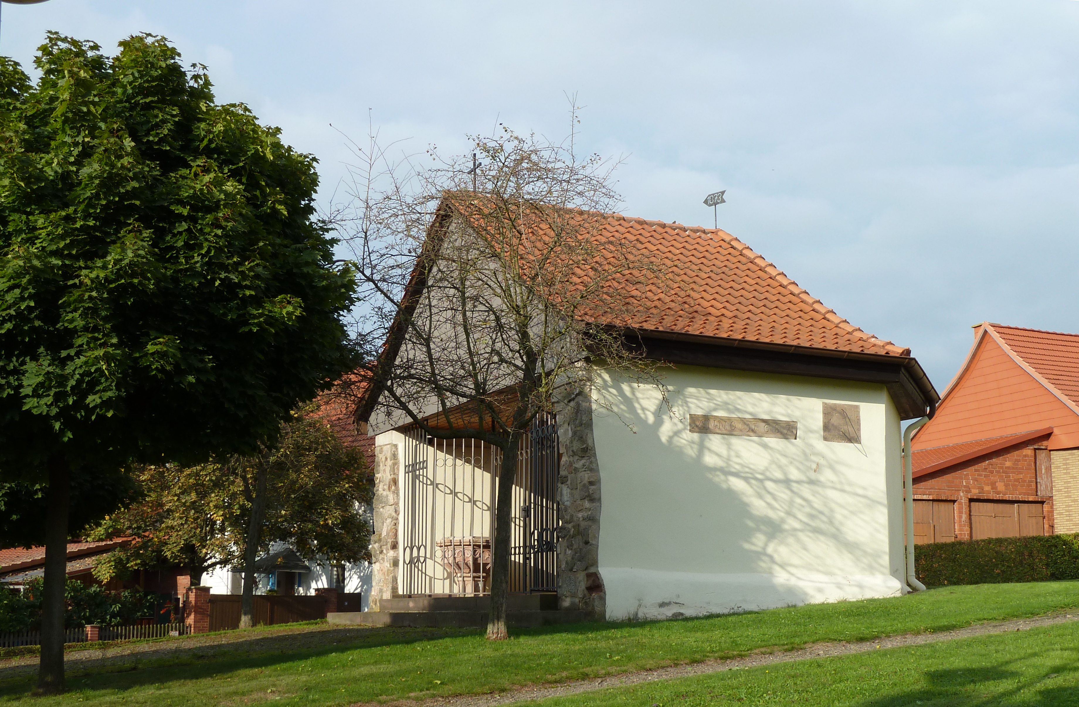 Chorraum der ansonsten 1983 abgetragenen katholischen Kirche St. Nikolaus in Tiftlingerode, Duderstadt, niedersächsisches Eichsfeld. Erbaut 1687